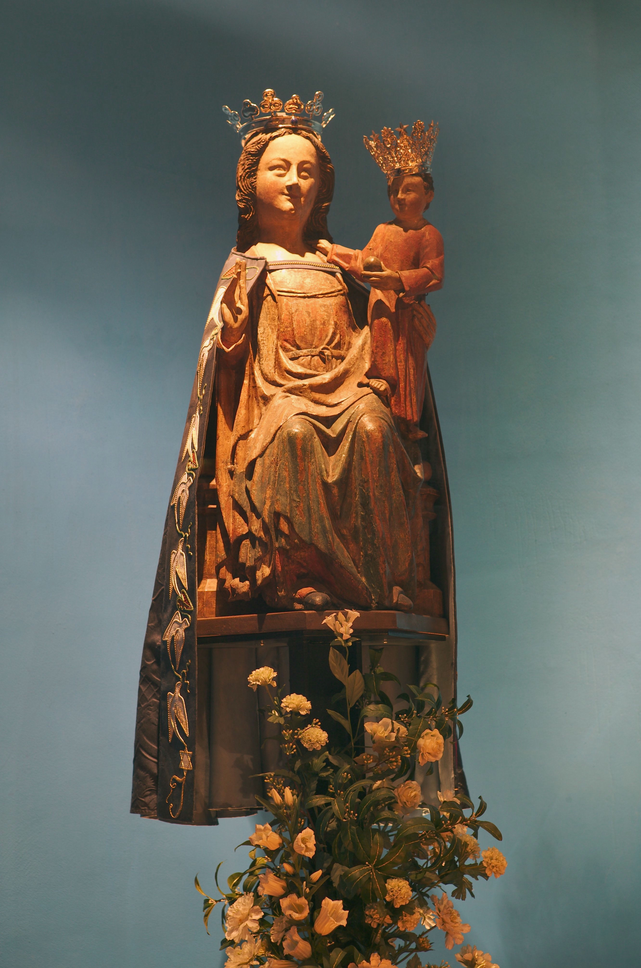 Pastorie van de Rooms-katholieke Maria van Jessekerk: Interieur, beeld van Maria van Jesse, circa 1330 - 1340. (opmerking: Publicatie 400 jaar kerken in 'De Papenhoek' foto gebruikt voor boek, pagina's 6 en 63)